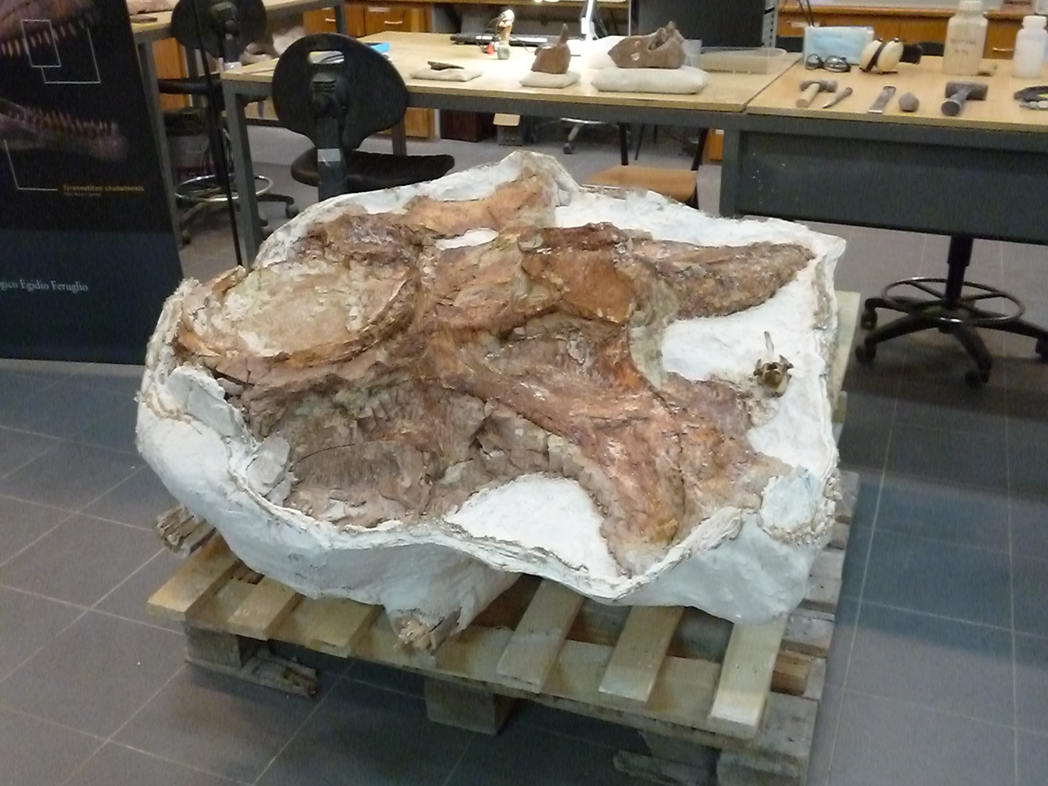 Fósiles del titanosauria del Chubut en el Museo Egidio Feruglio de Trelew, Chubut, Argentina. Descubiertos en 2013 y presentados en 2014, supuestamente se trata del animal terrestre más grande de la historia de la Tierra. Pesaría 4 toneladas más que el Argentinosaurus y su fémur mide más de dos metros.